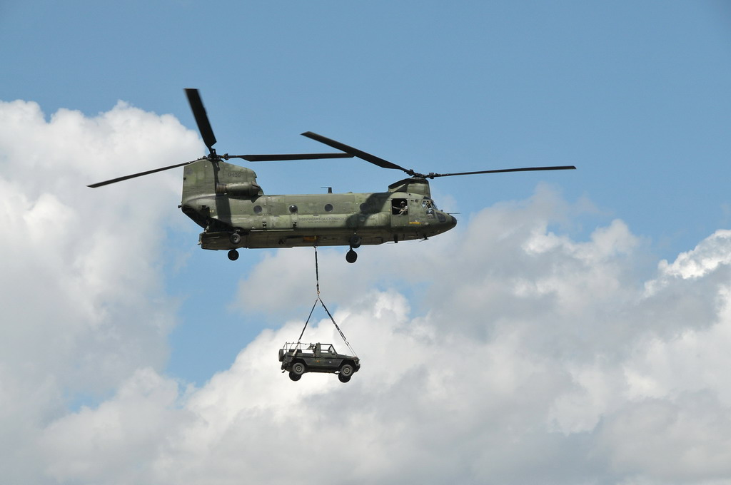 De Chinook is een zware door Boeing ontwikkelde transporthelikopter. De Chinook is ontworpen voor het transport van troepen en alle benodigde uitrusting voor op het gevechtsveld. Hij wordt ook gebruikt voor medische evacuaties, het verplaatsing van zeer zware materialen (ook civiel) en SAR missies.